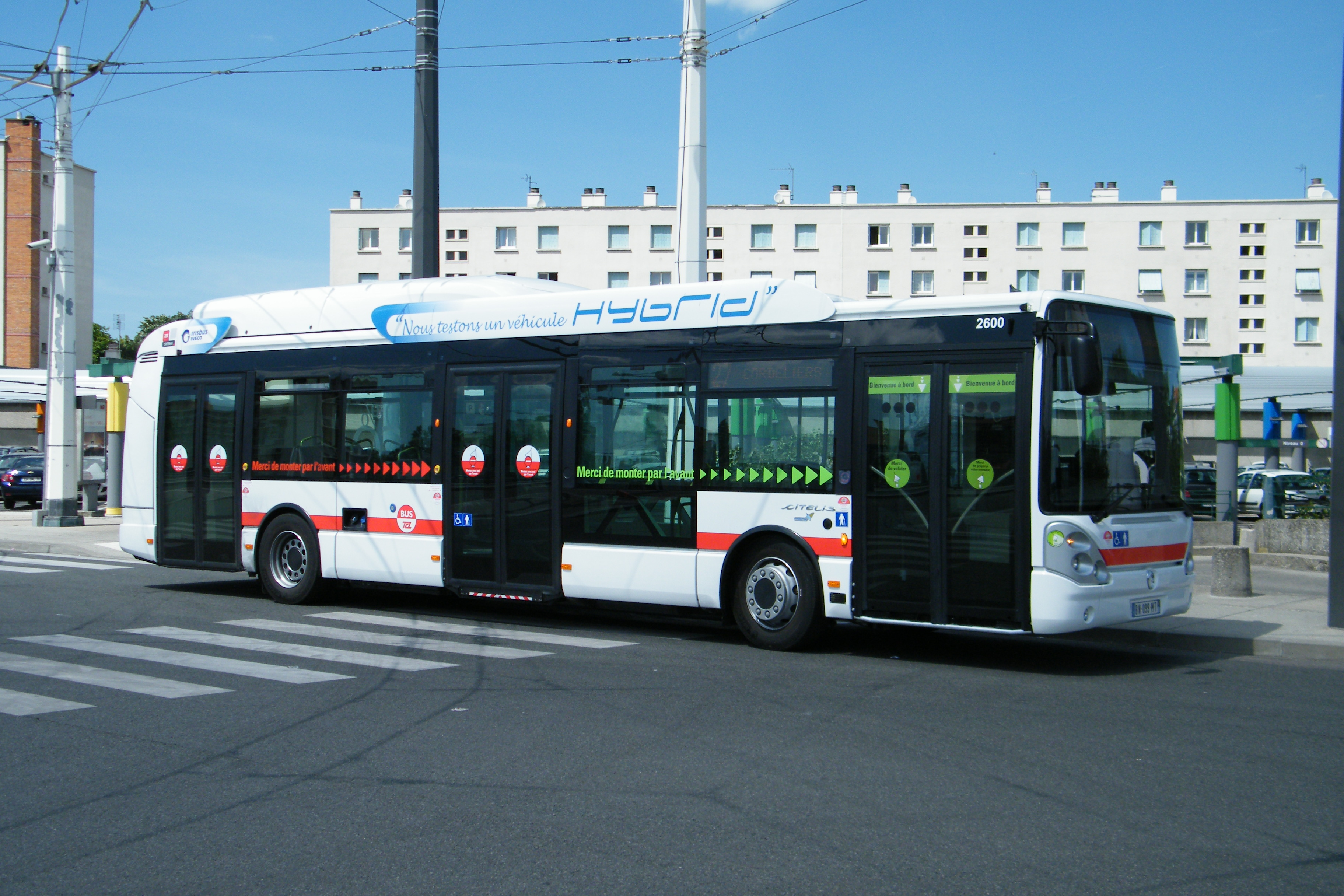 Irisbus Citelis 12 Hybride de démonstration sur le réseau TCL, ici au pôle d'échanges de Laurent Bonnevay.